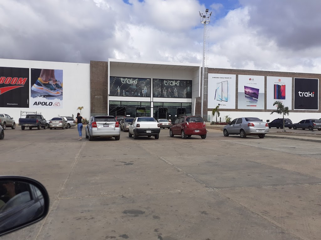 Valle de la Pascua.